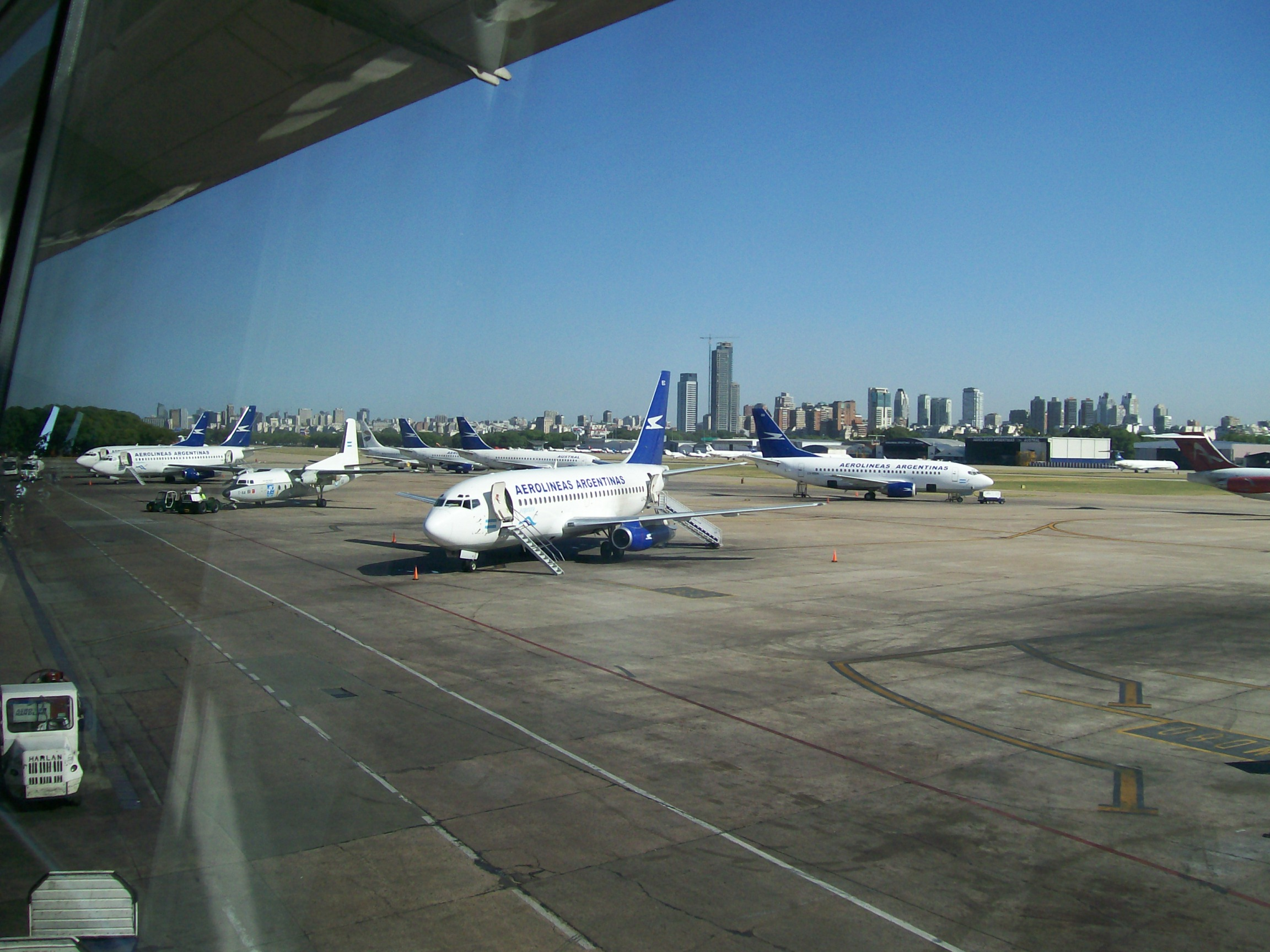 Avión de la compañía Aerolineas Argentinas en Aeroparque